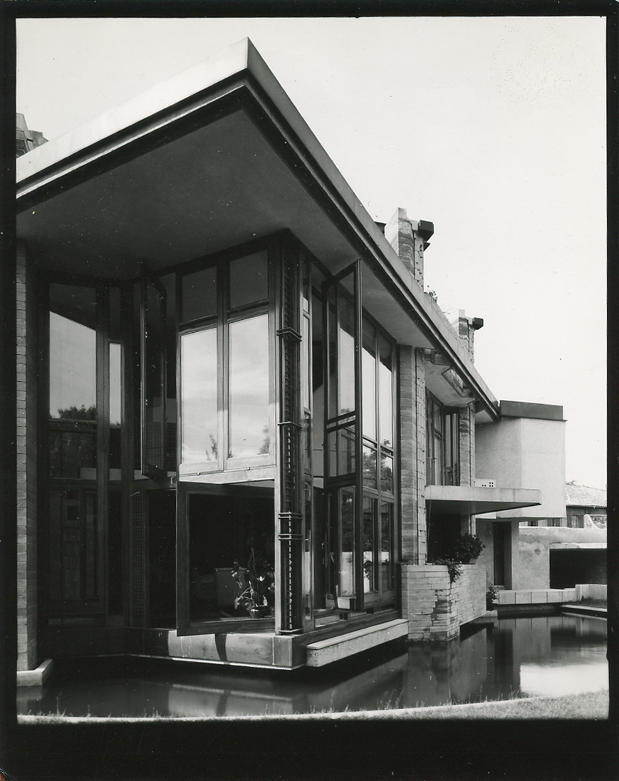 Servizio fotografico : Udine, 1961 / Paolo Monti. - Fototipi: 2 : Positivo b/n, gelatina bromuro d'argento/ carta, provino a contatto da pellicola 10x12. - ((Serie costituita da 2 provini a contatto identificati con i nn.: 115 e 117. La suddetta serie è contenuta nella scatola dei contatti identificata con il n. 142; sul coperchio iscrizione manoscritta a pennarello: "Contatti 7a"